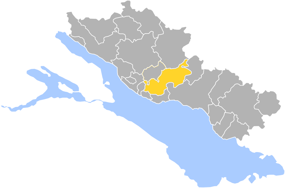 Markdorf in Bodenseekreis